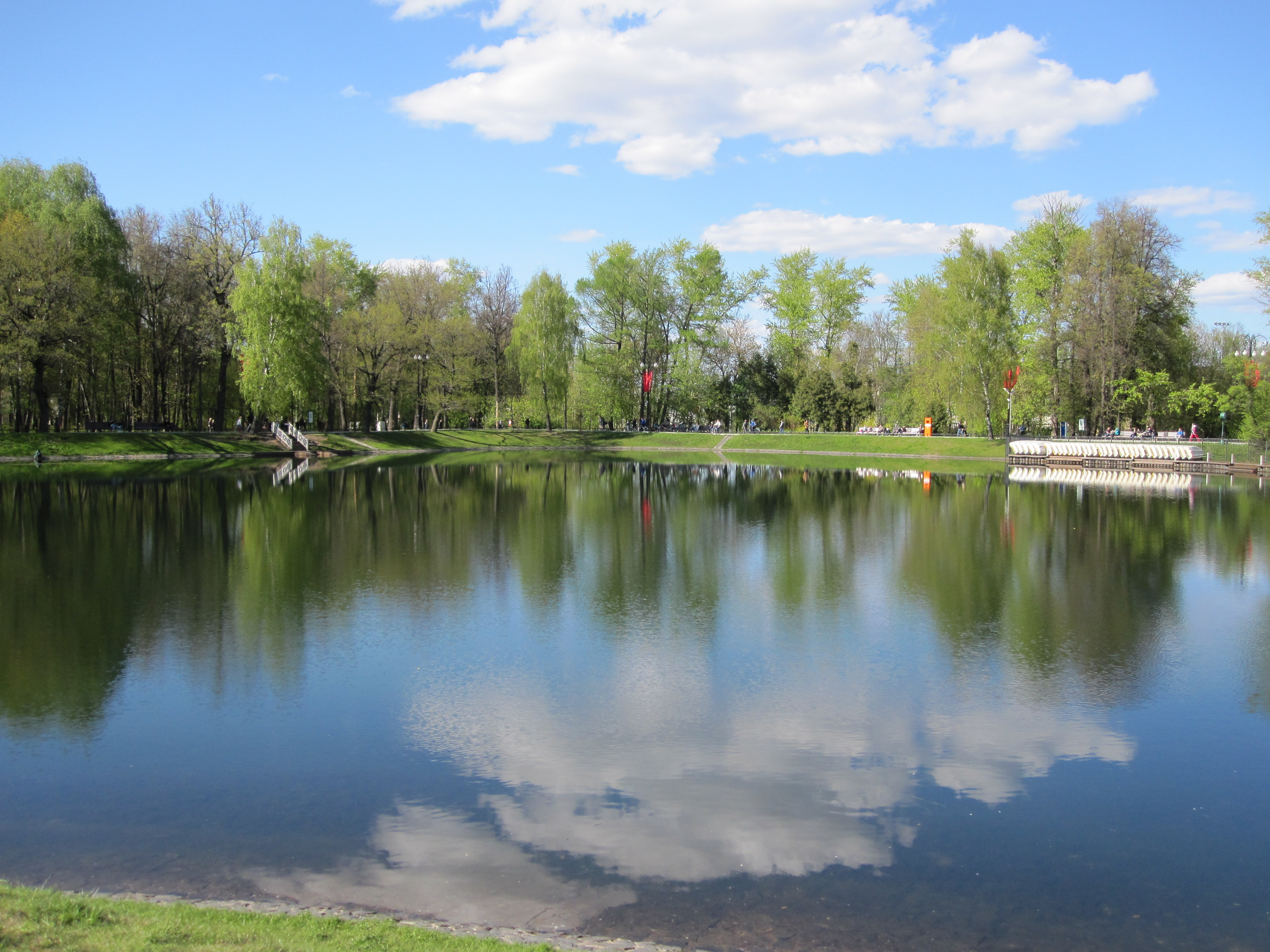 Парк Останкино: Северо-Восточный округ, Москва This image is related to the protected area of Russia number 7710205